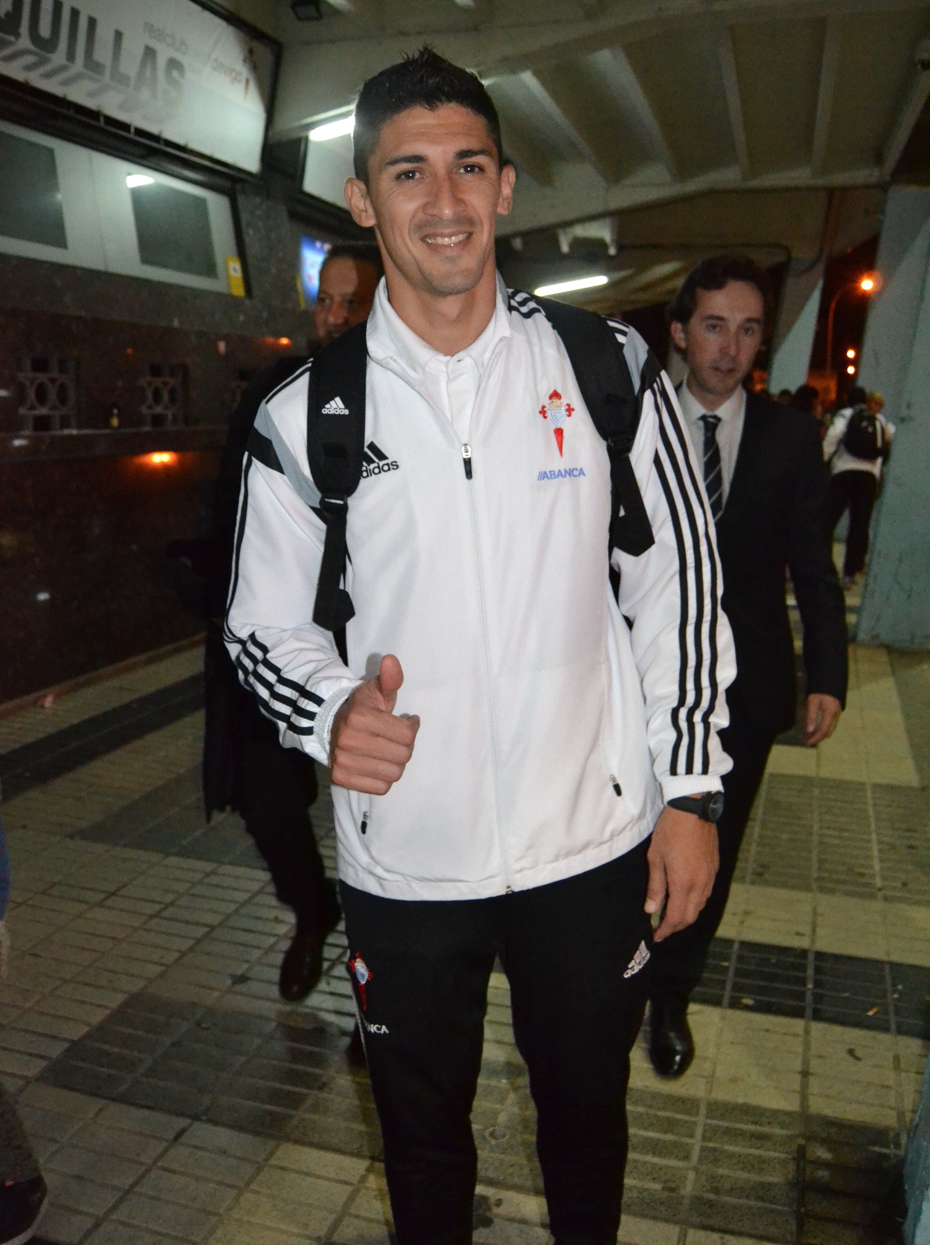 O futbolista Pedro Pablo Hernández